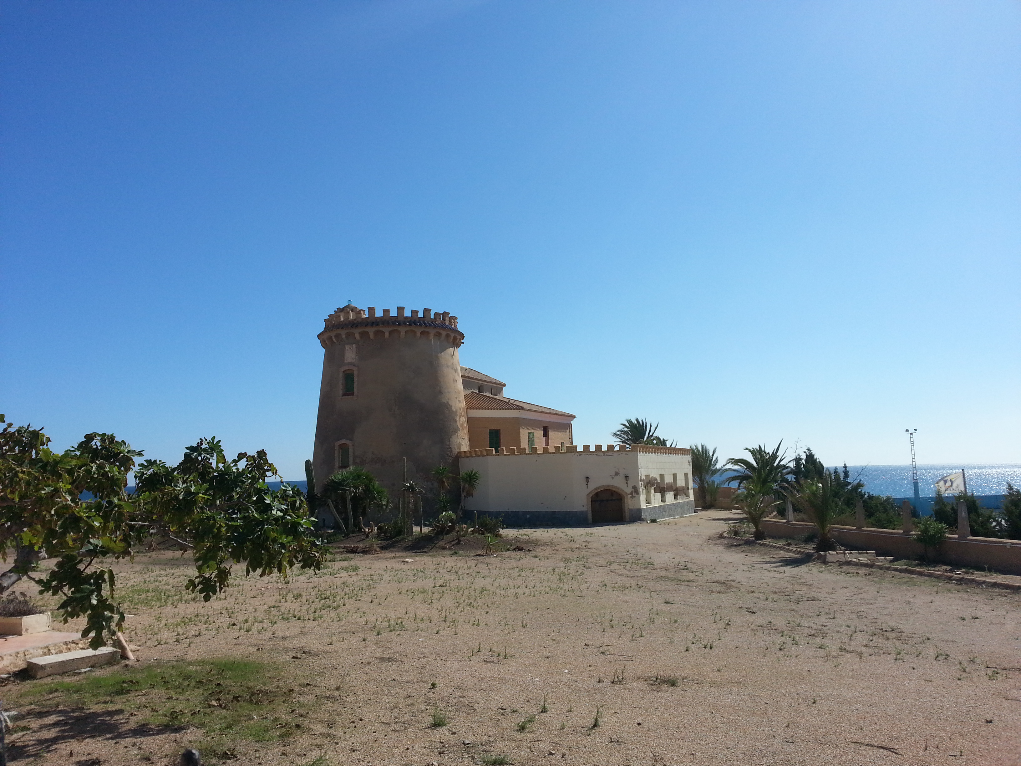 Torre vigía Torre de la Horadada- vista lateral. Pilar de la Horadada (Alicante)